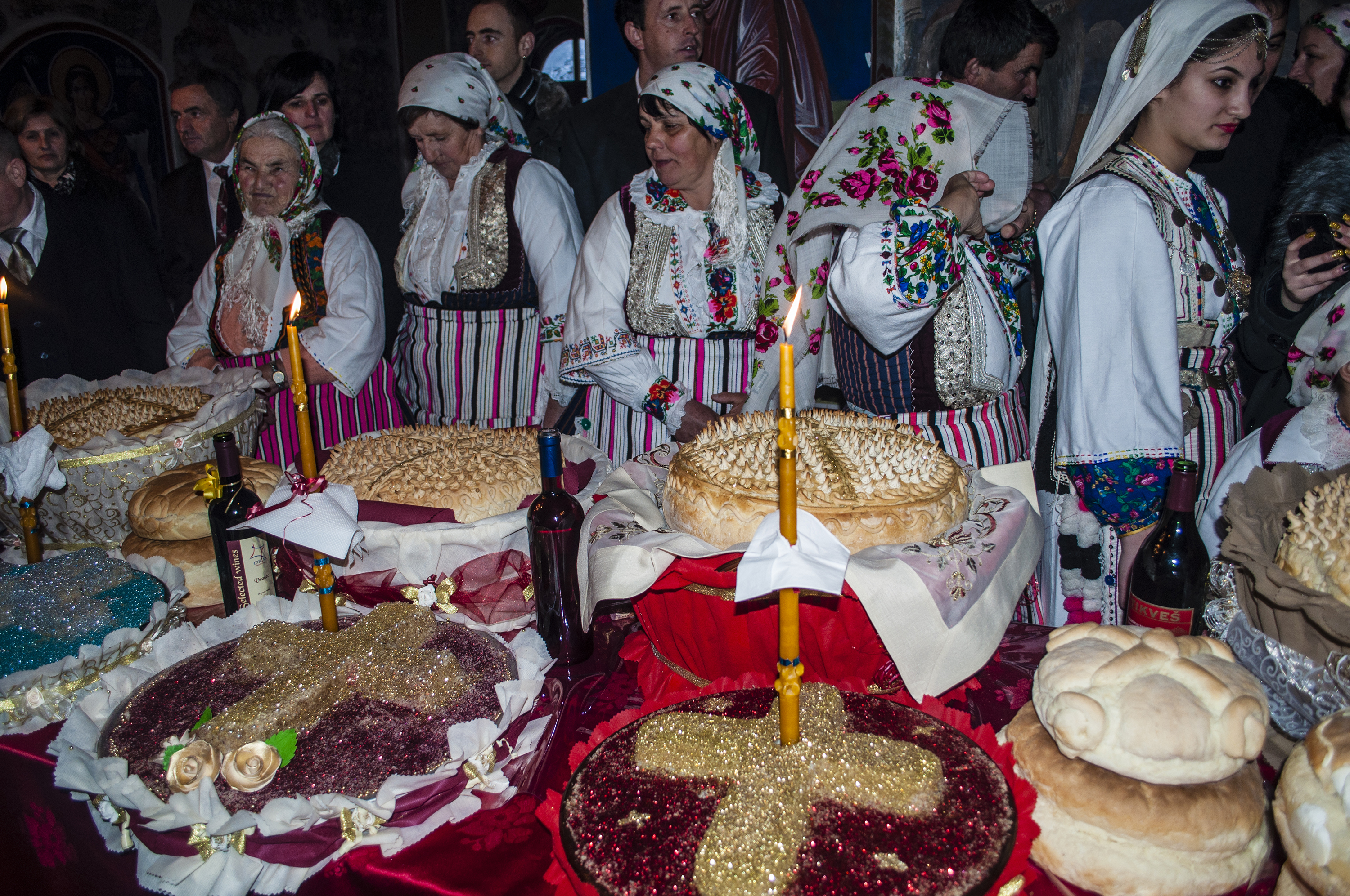 според македонските обичаи кумовите вадат убаво украсени погачи и украсена блага пченица за време на Водици, во Драслајца, Струга